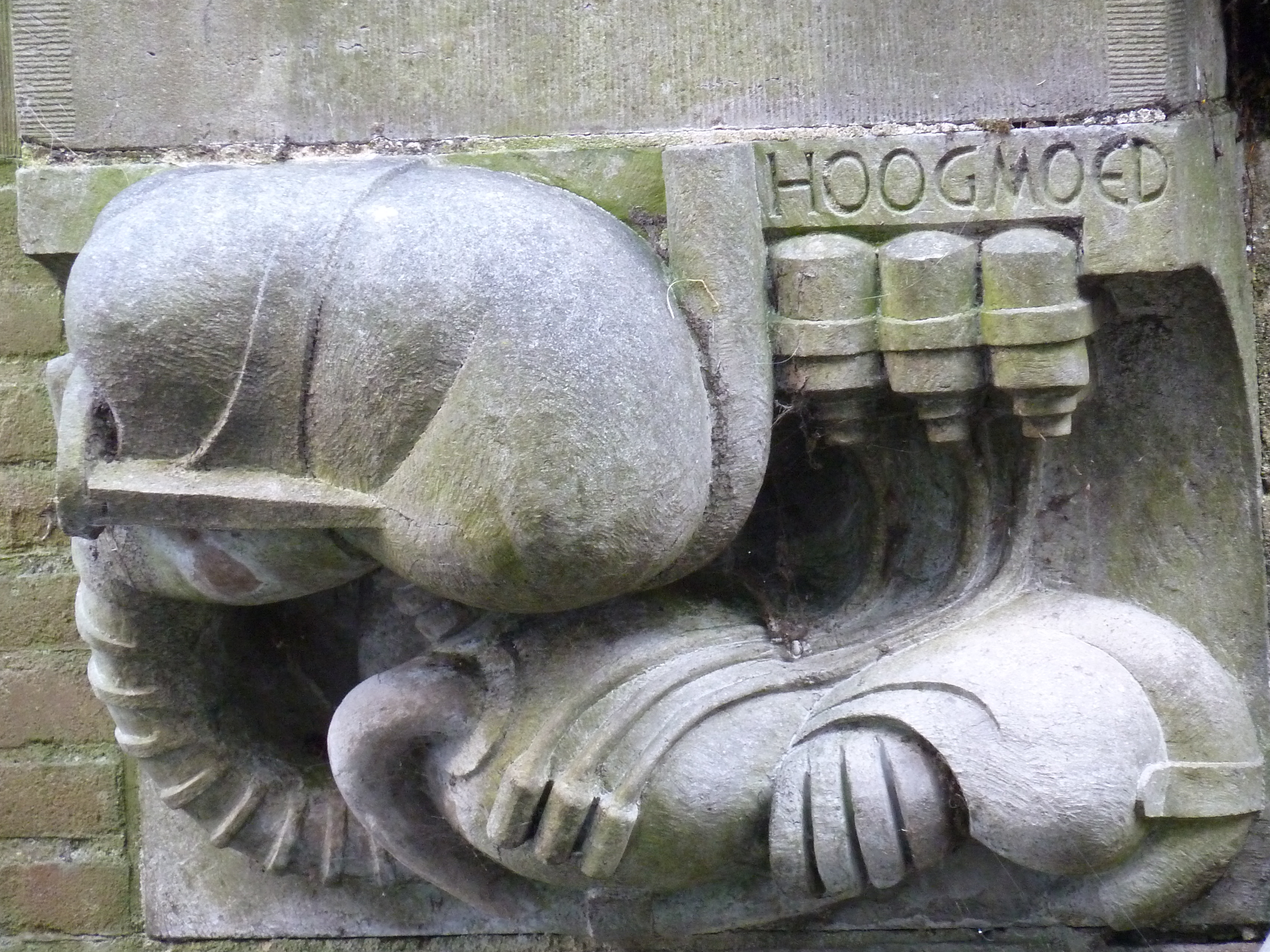 Straatlantaarnconsole, Drift 25-27, Utrecht, NL.